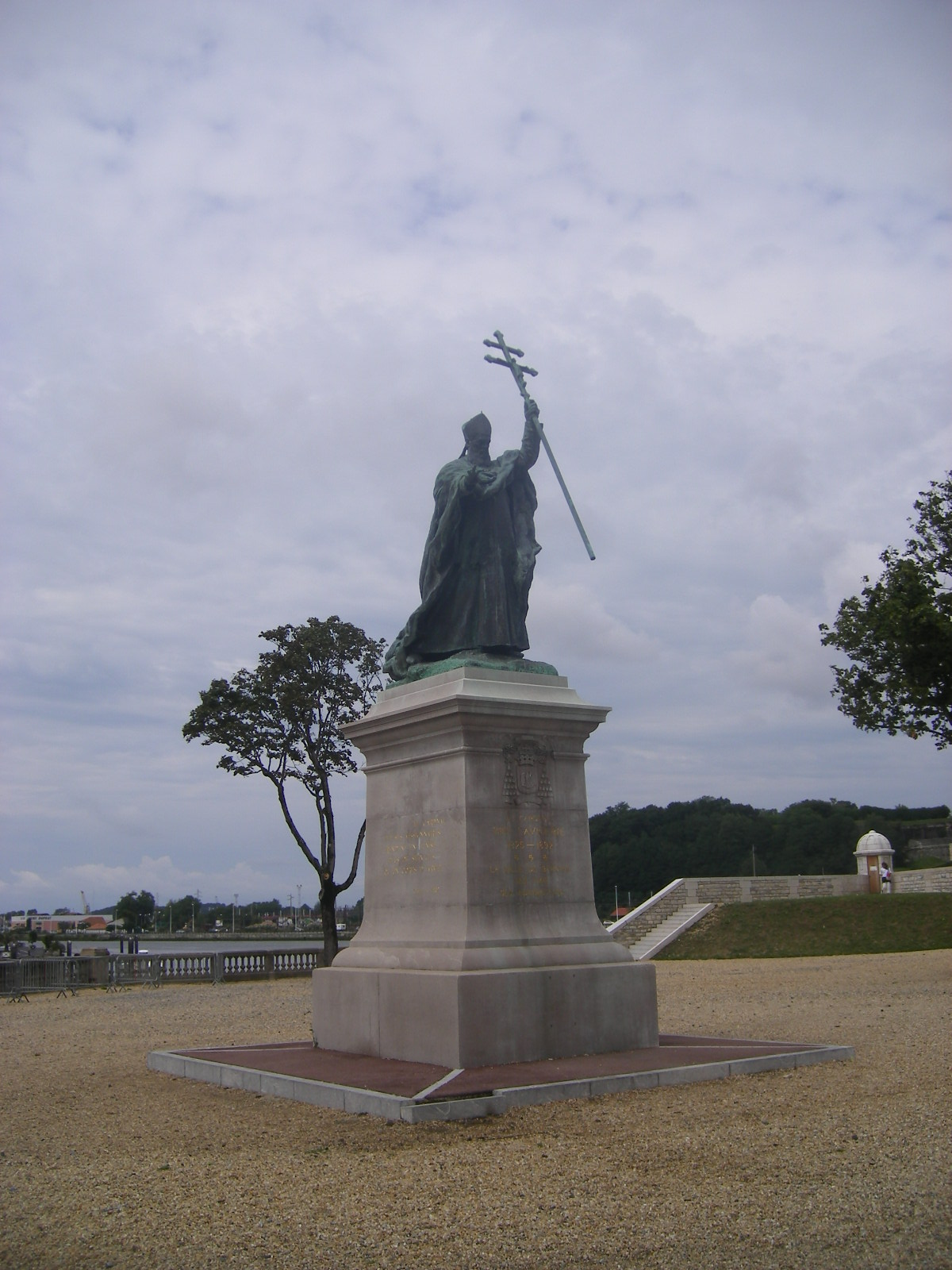 Bayonne-Statue du Cardinal Lavigerie